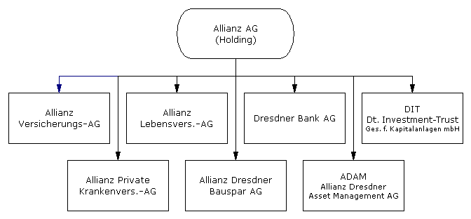 Grobe Konzernstruktur der Allianz AG, Deutsche abhängige Unternehmen.